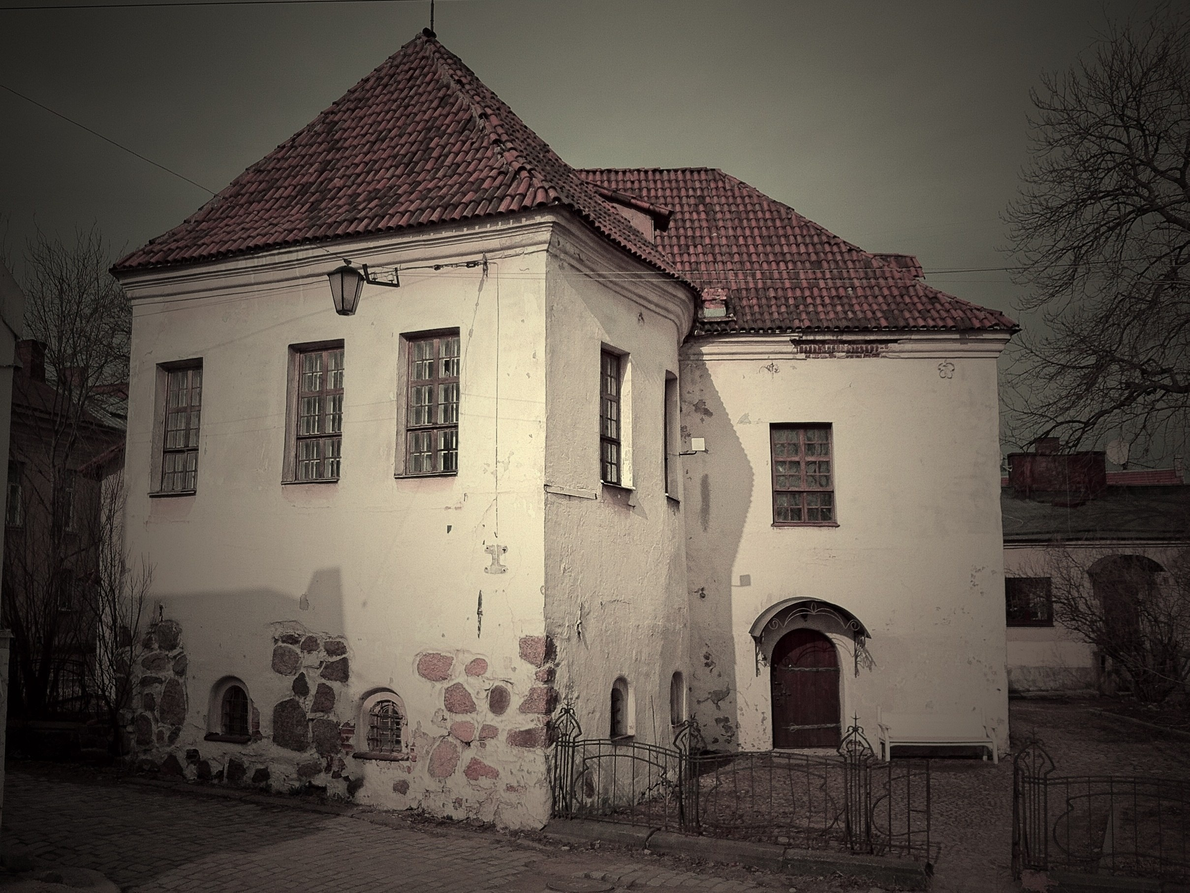 Костел Гиацинта (Рыцарский дом) (Санкт-Петербург и Лен.область, Выборг, Водной заставы улица, 4)